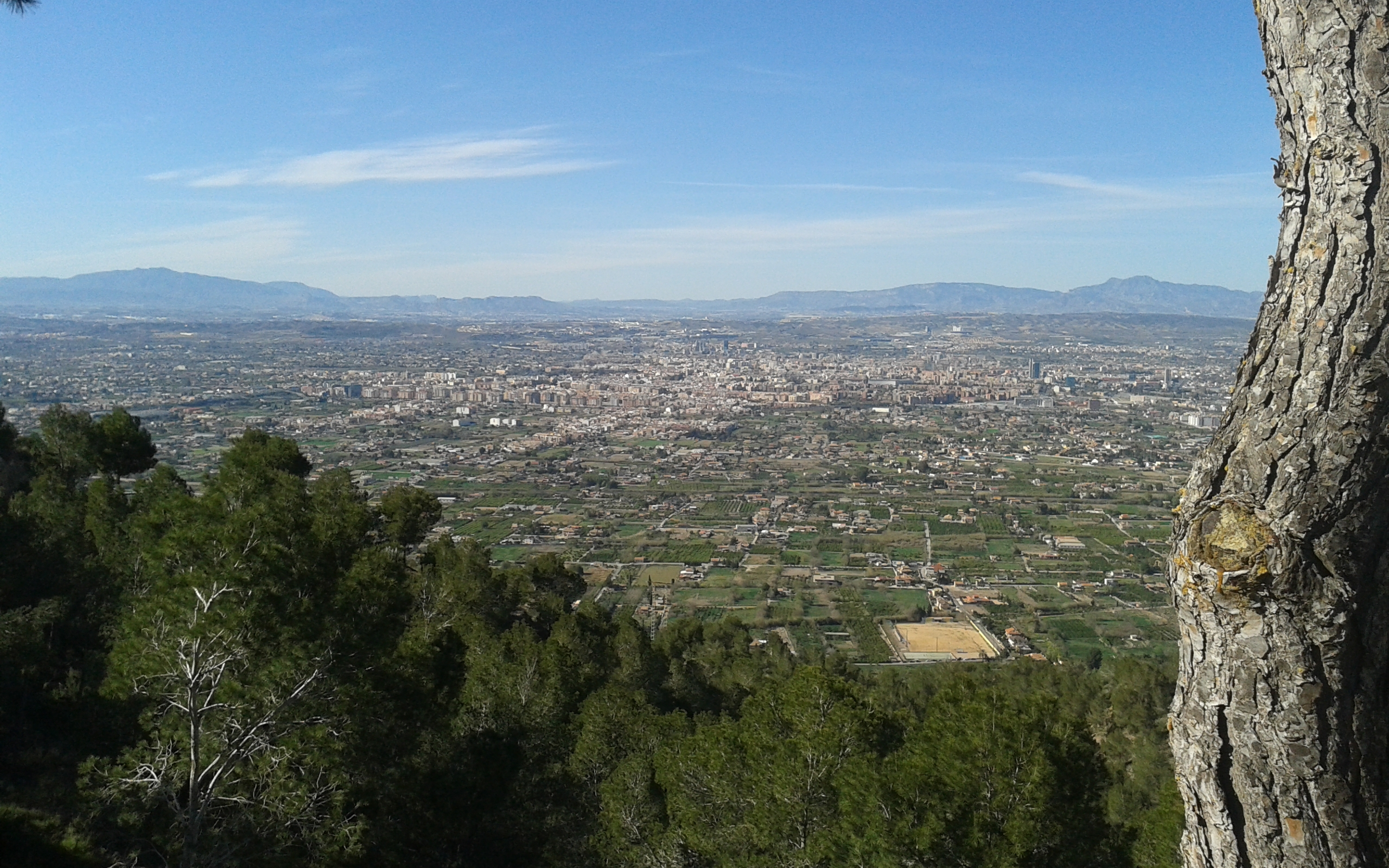 Carrascoy y El Valle This is a photography of a Special Area of Conservation in Spain with the ID: ES6200002. Natura2000 entry, EEA entry